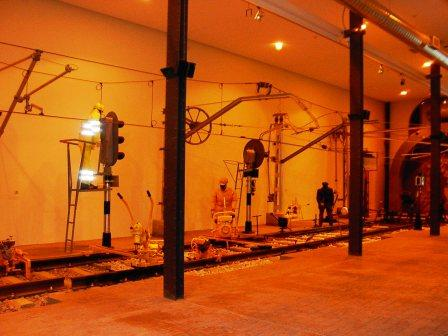 Sala de infraestructura del Museo Nacional Ferroviario